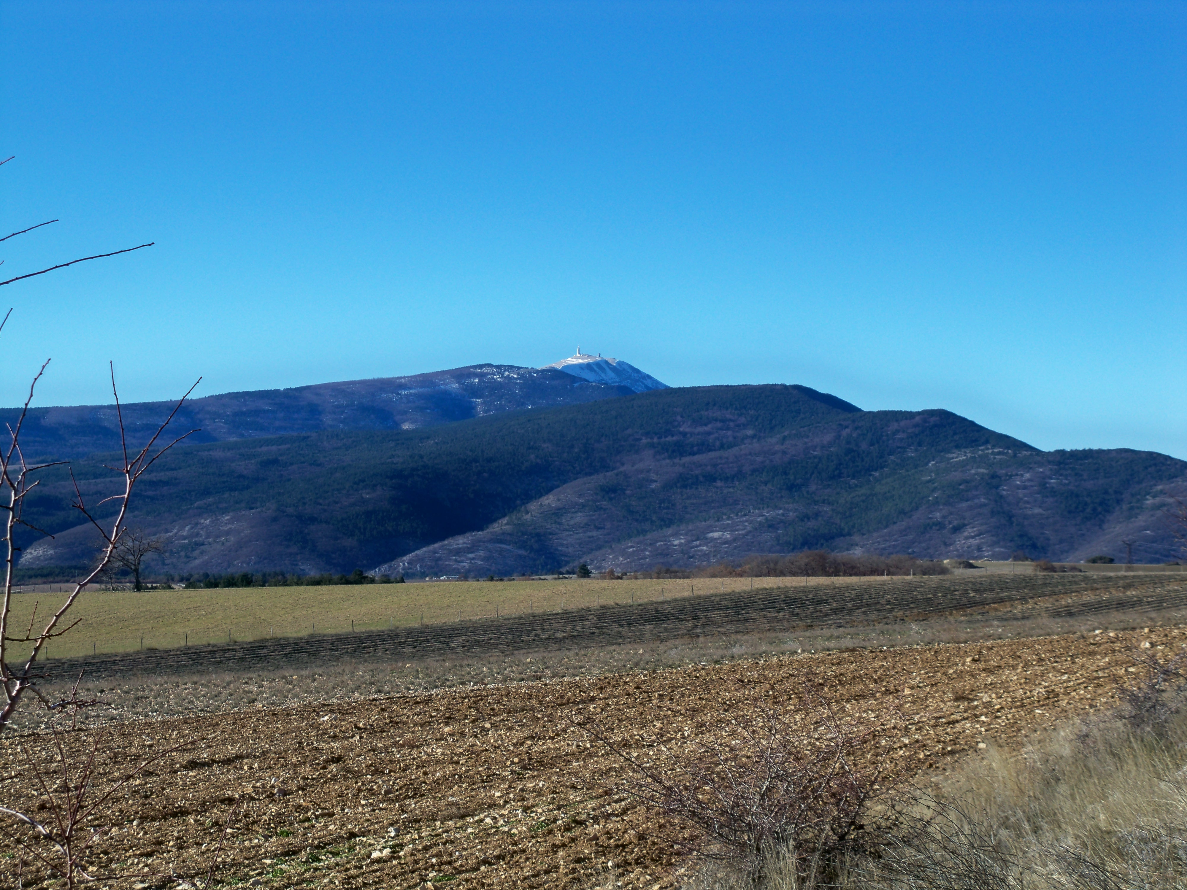 Mont Ventoux vue du Chateau de la Gabelle (Ferrassières)